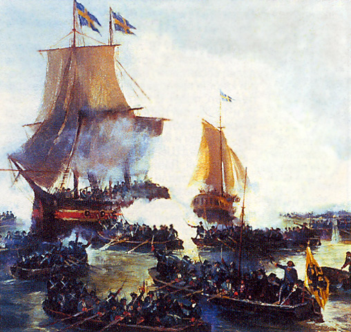 Взятие Петром Первым шведских кораблей «Гедан» и «Астрильд» в устье Невы